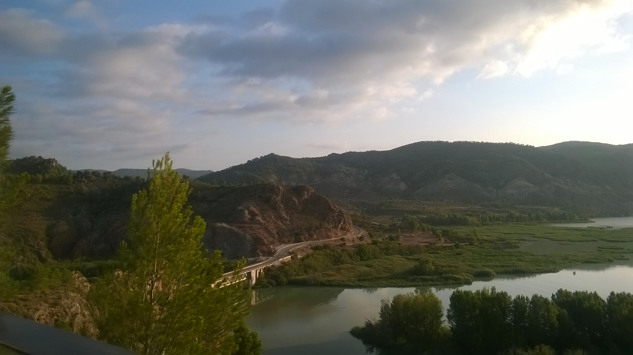 Vistas de Cofrentes tomadas durante el verano de 2014 por Isabel Valiente de la Granja.